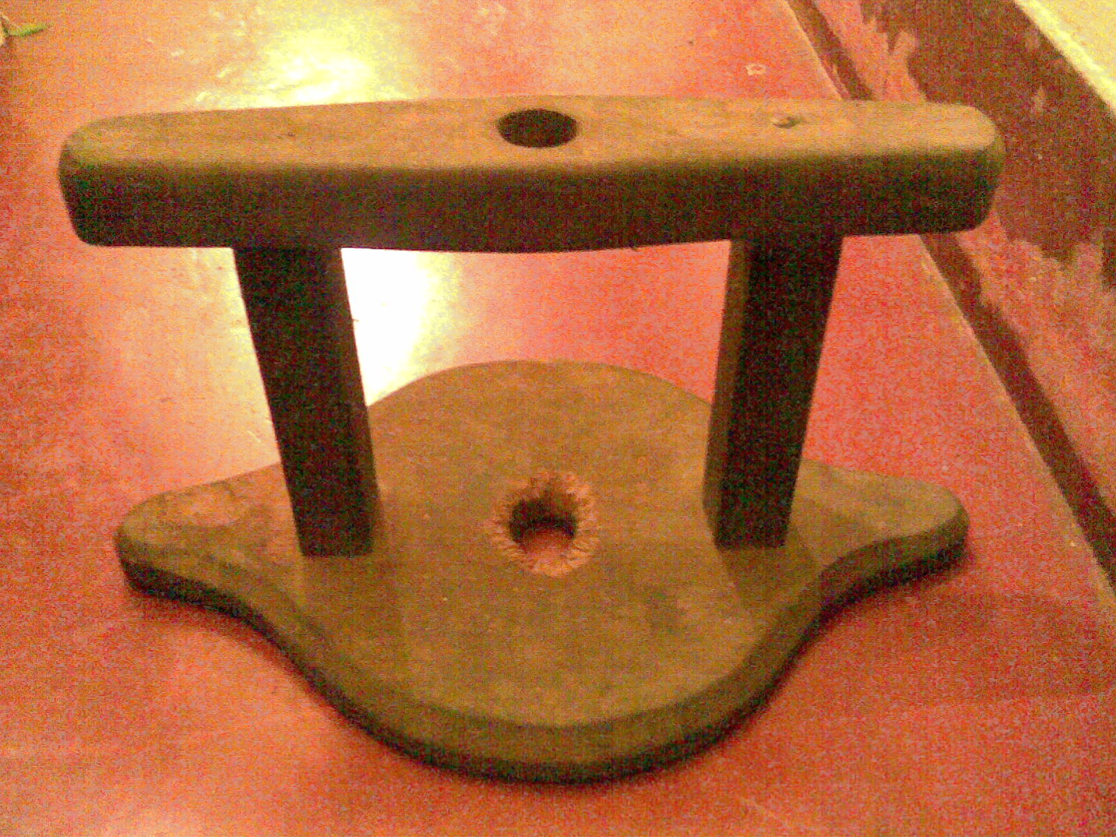 തൈരുകലത്തില്‍ മത്ത് (കടകോല്‍) ഇട്ട് കോല്‍ ദ്വാരത്തിലൂടെ വരത്തക്കവണ്ണം തൈരുകലത്തിന്റെ മുകളില്‍ ഇത് വച്ച് കോലില്‍ ചരട് കോർത്ത് വലിച്ചാണ് കടയുന്നത്.